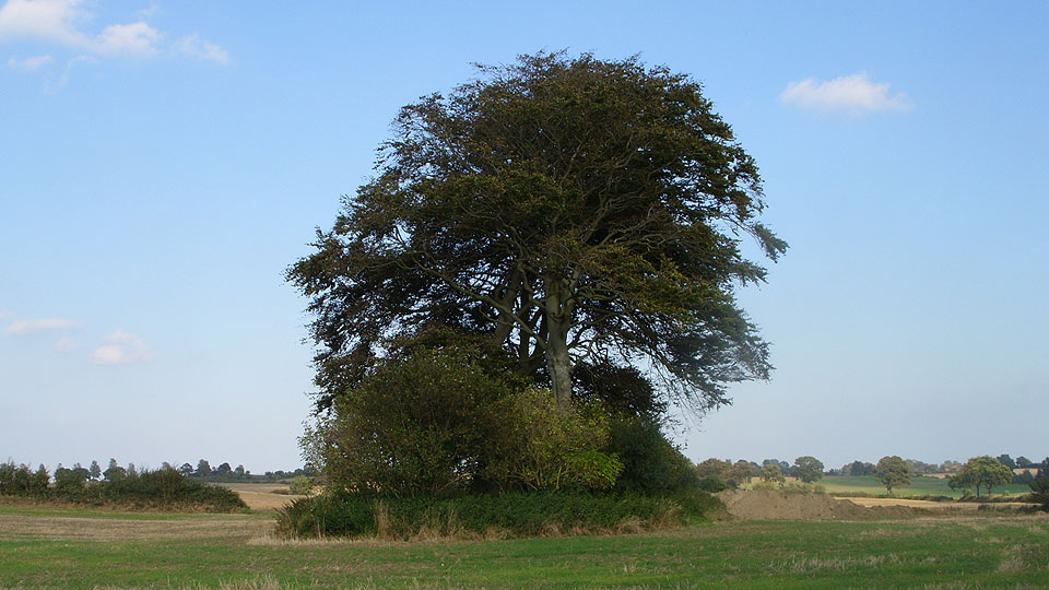 Langbetten von Rothensande